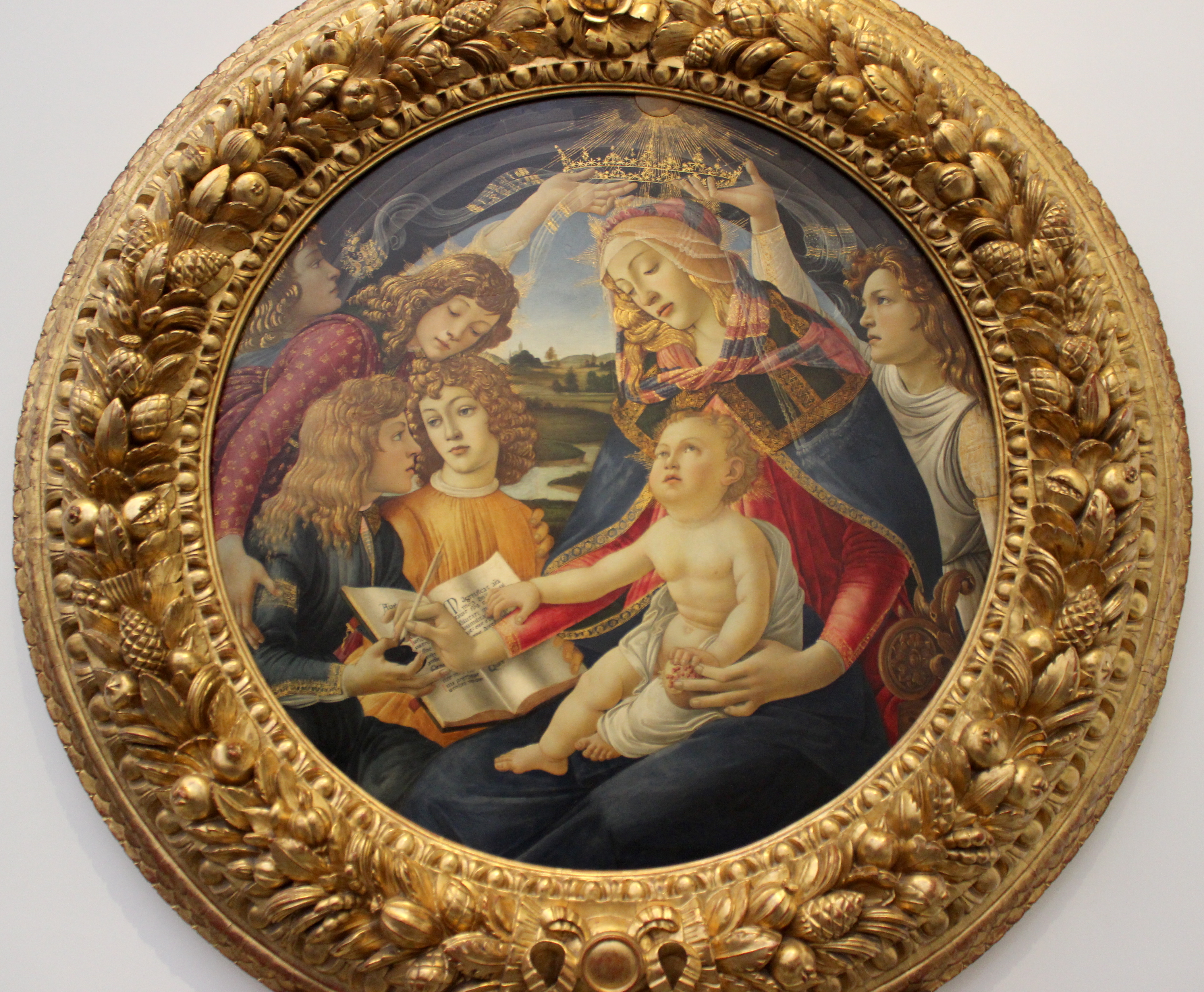 Florencia, Uffizi, Madonna del Magnificat.